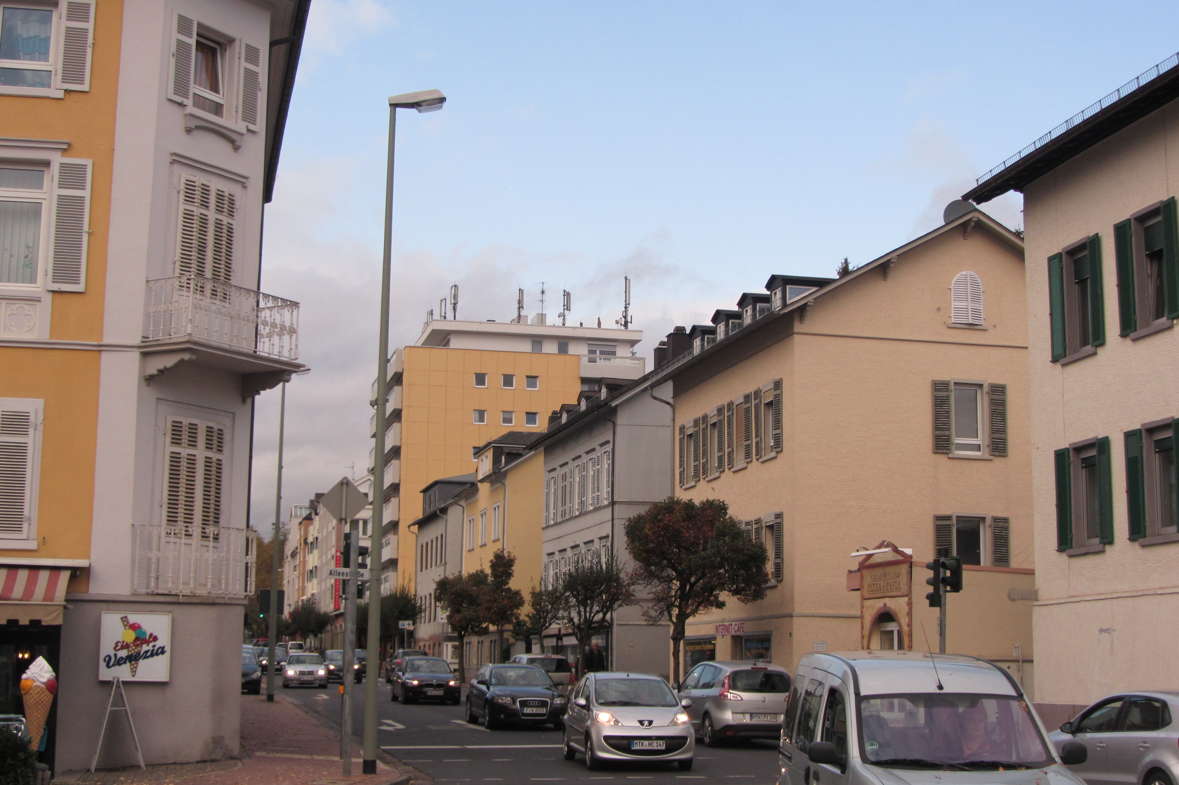 Königsteiner Straße Ecke Alleestraße